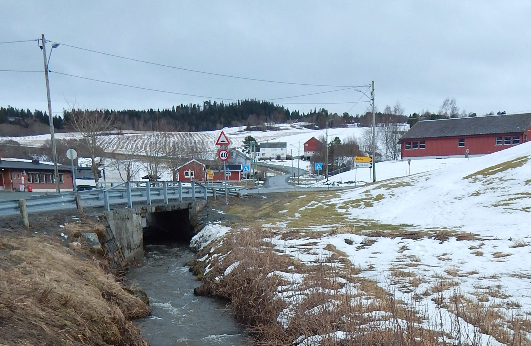 Krysset mellom fylkesvei 750 (innover i bildet) og primær fylkesvei 709 like ved Skaun kirke. Vennabekken renner under sistnevnte.